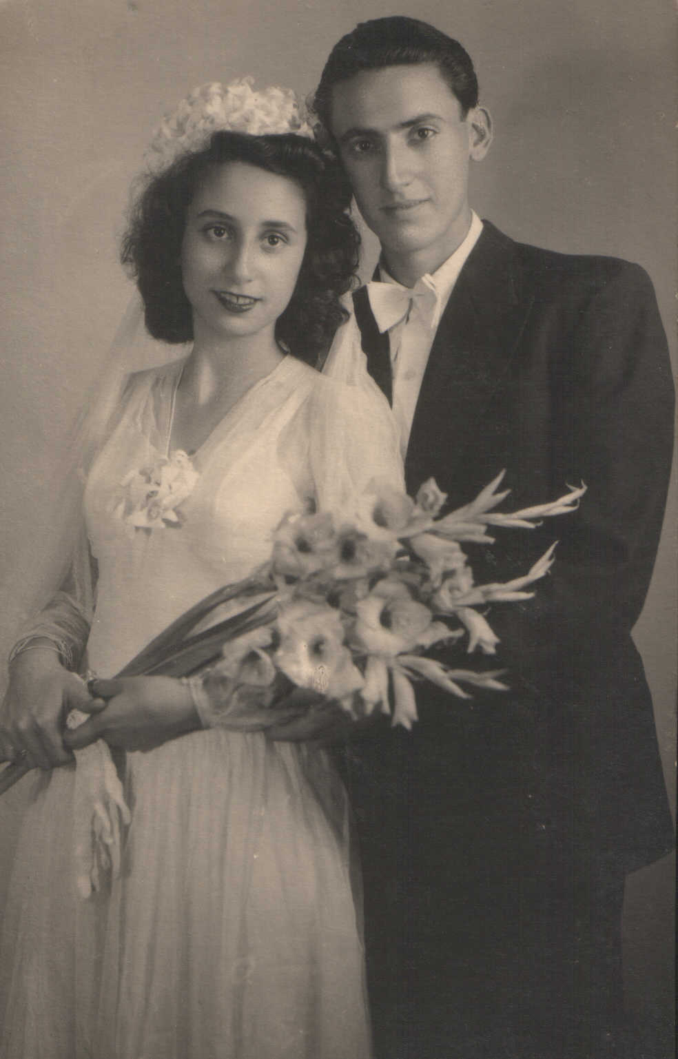 מרדכי ואסתר מנו בחתונתם